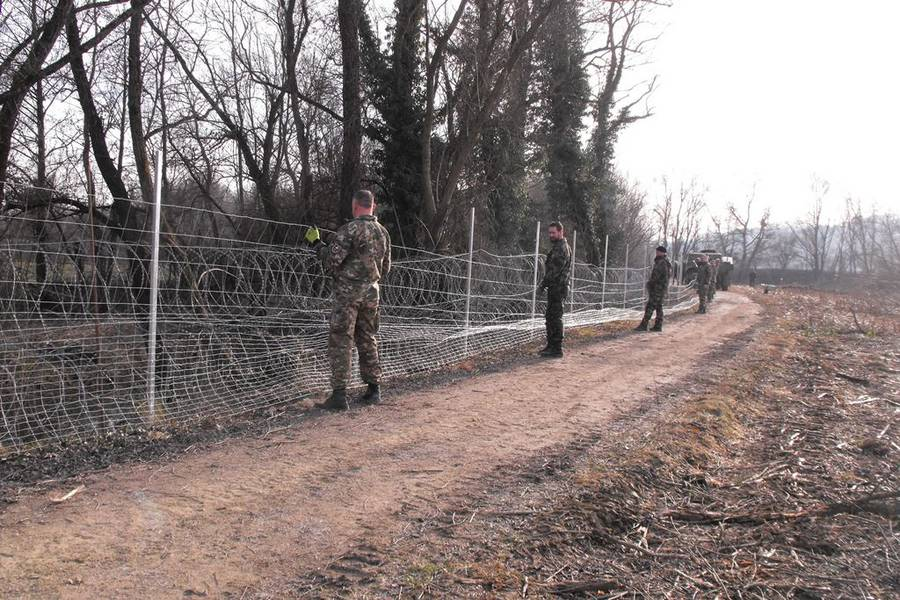 Slovenska vojska v projektu migrant.